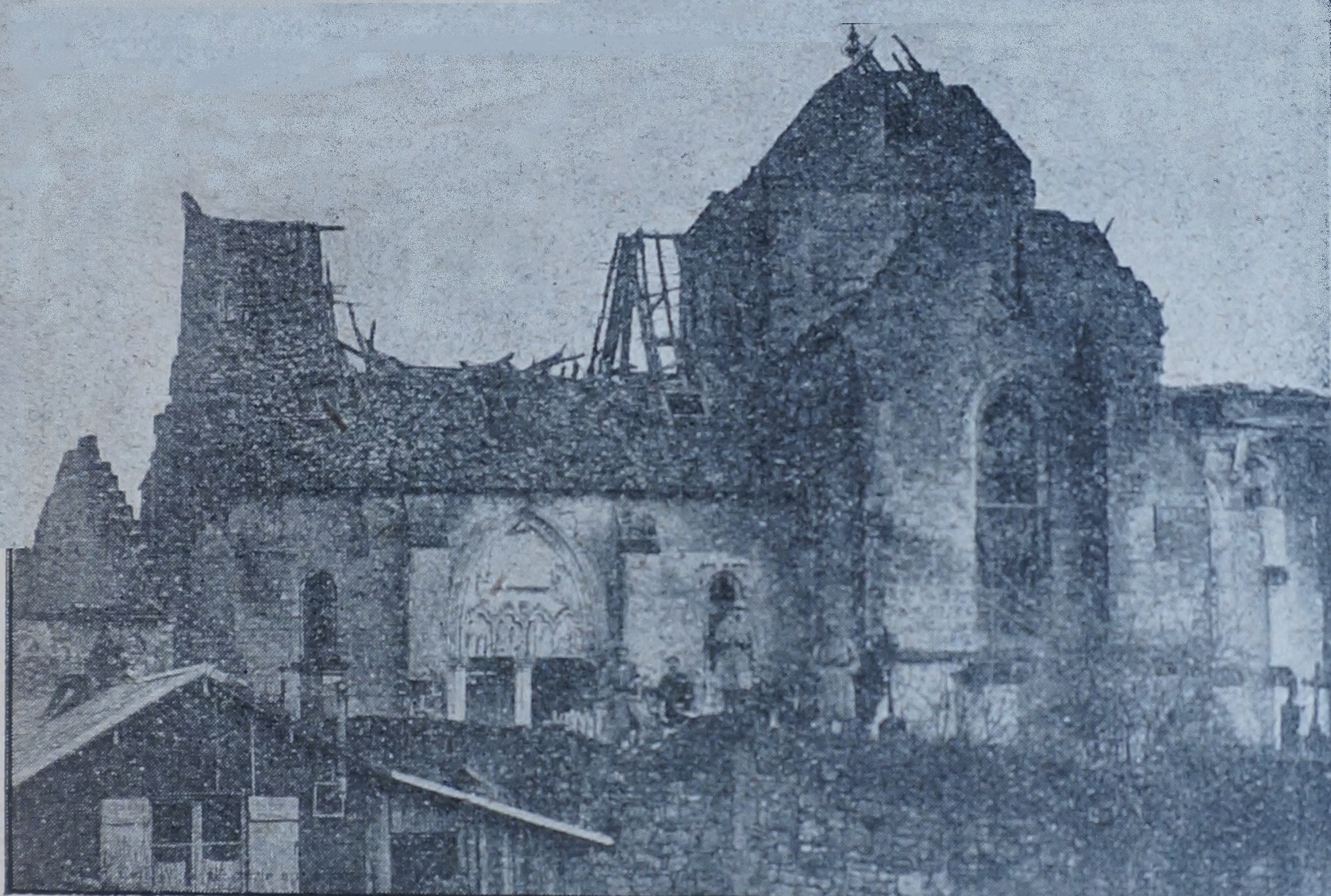 Église d'e st-Mard la commune au sortir de la Première Guerre mondiale.